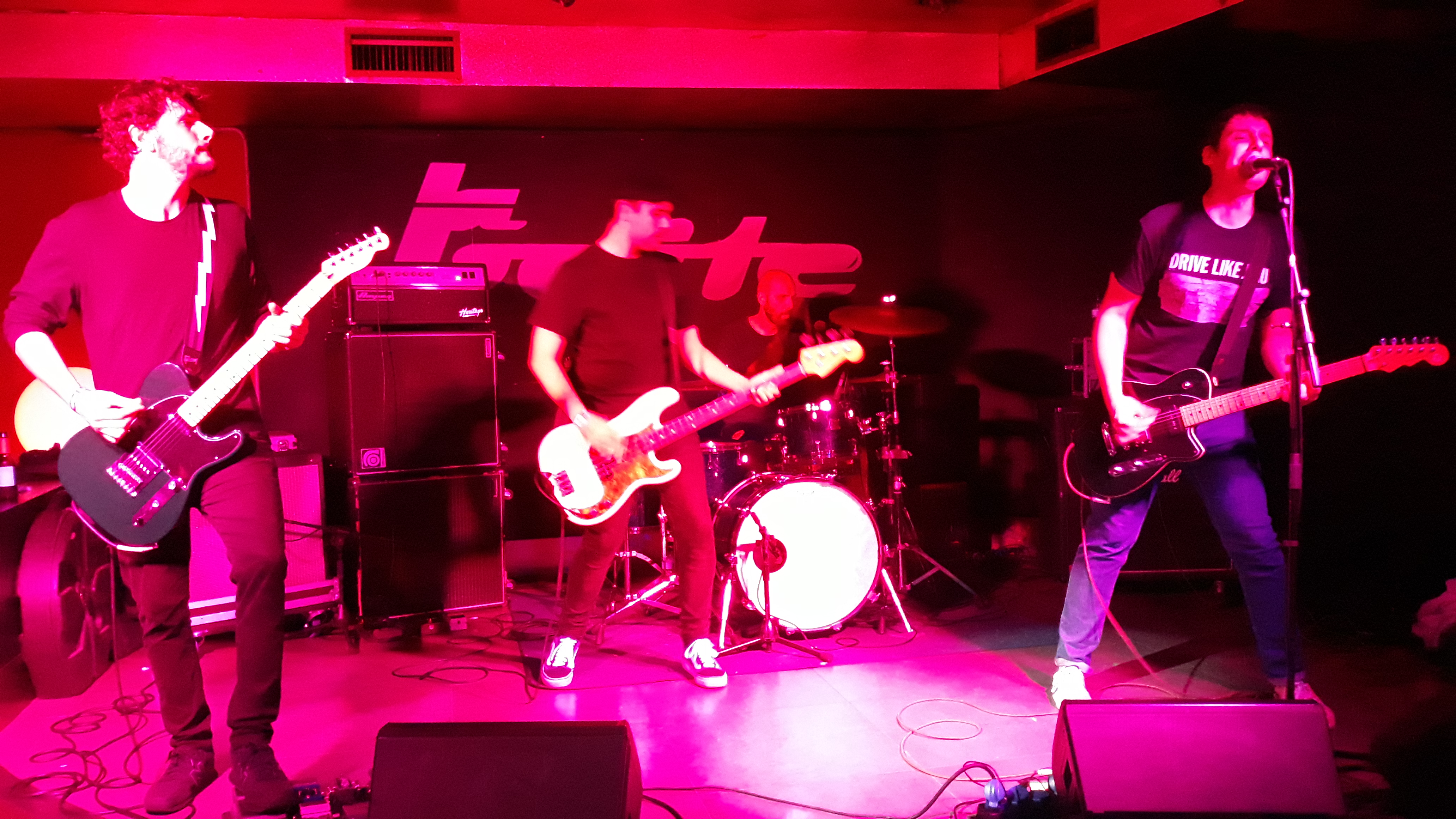 Serpent a La Boite (Lleida, 07/12/2019)